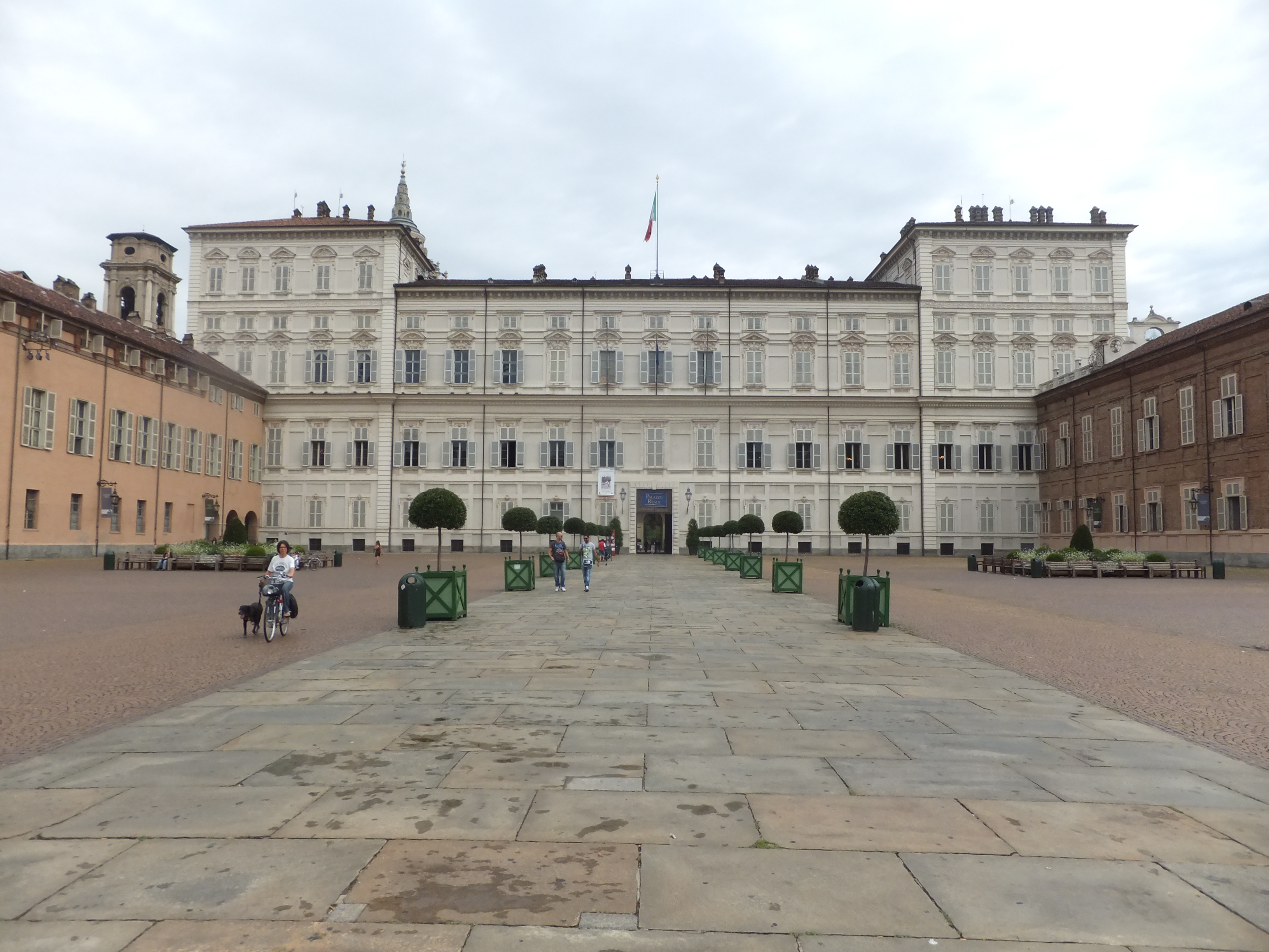 Royal Palace (Palazzo Reale) in Turin, Italy